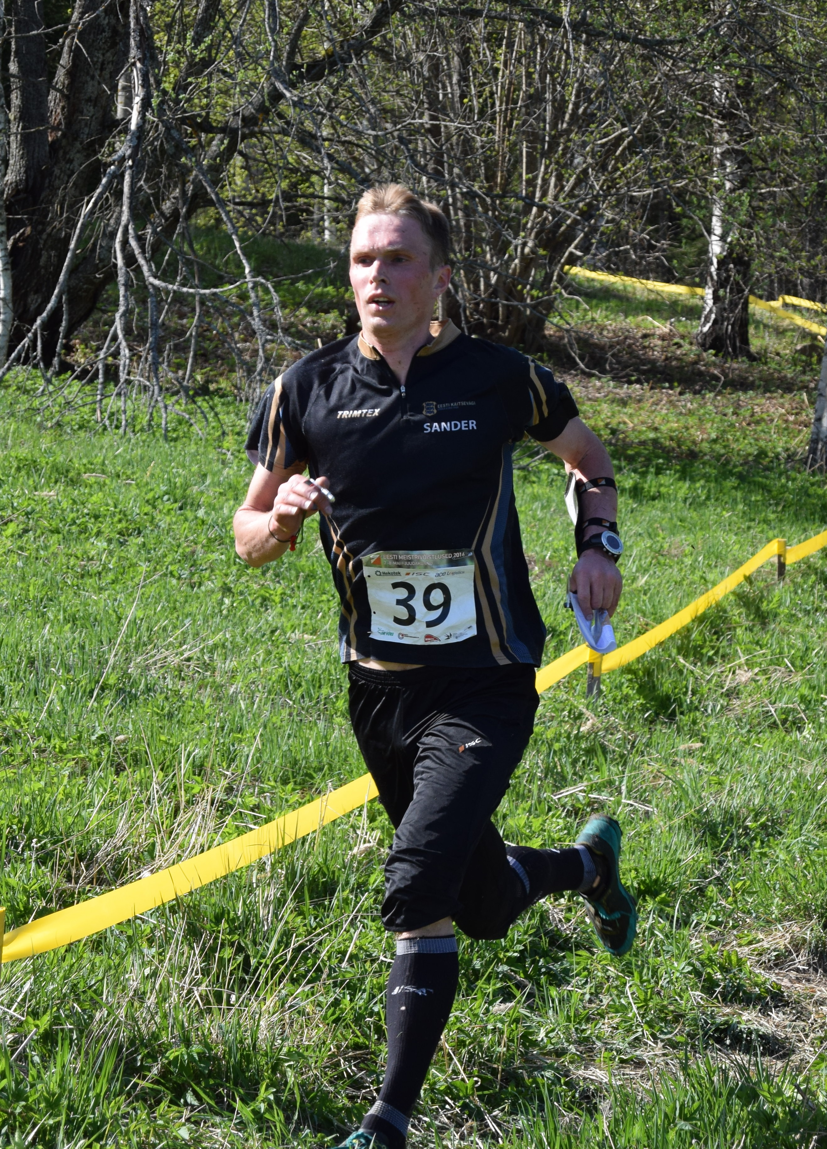 Sander Vaher 2016